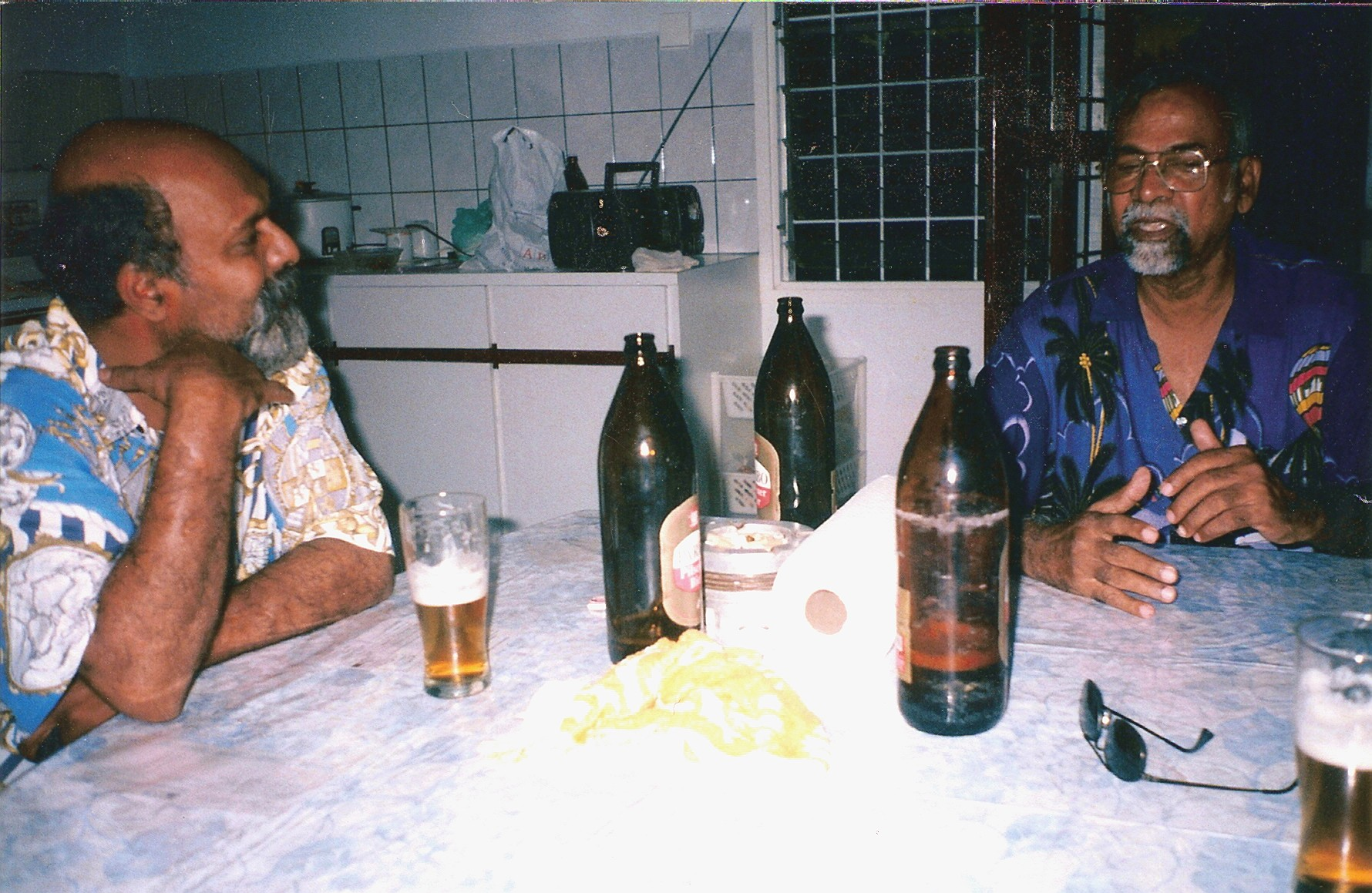 Twee belangrijke Sarnami dichters: Jit Narain en Shrinivási. Eigen opname, gemaakt ten huize van Narain, augustus 2000.